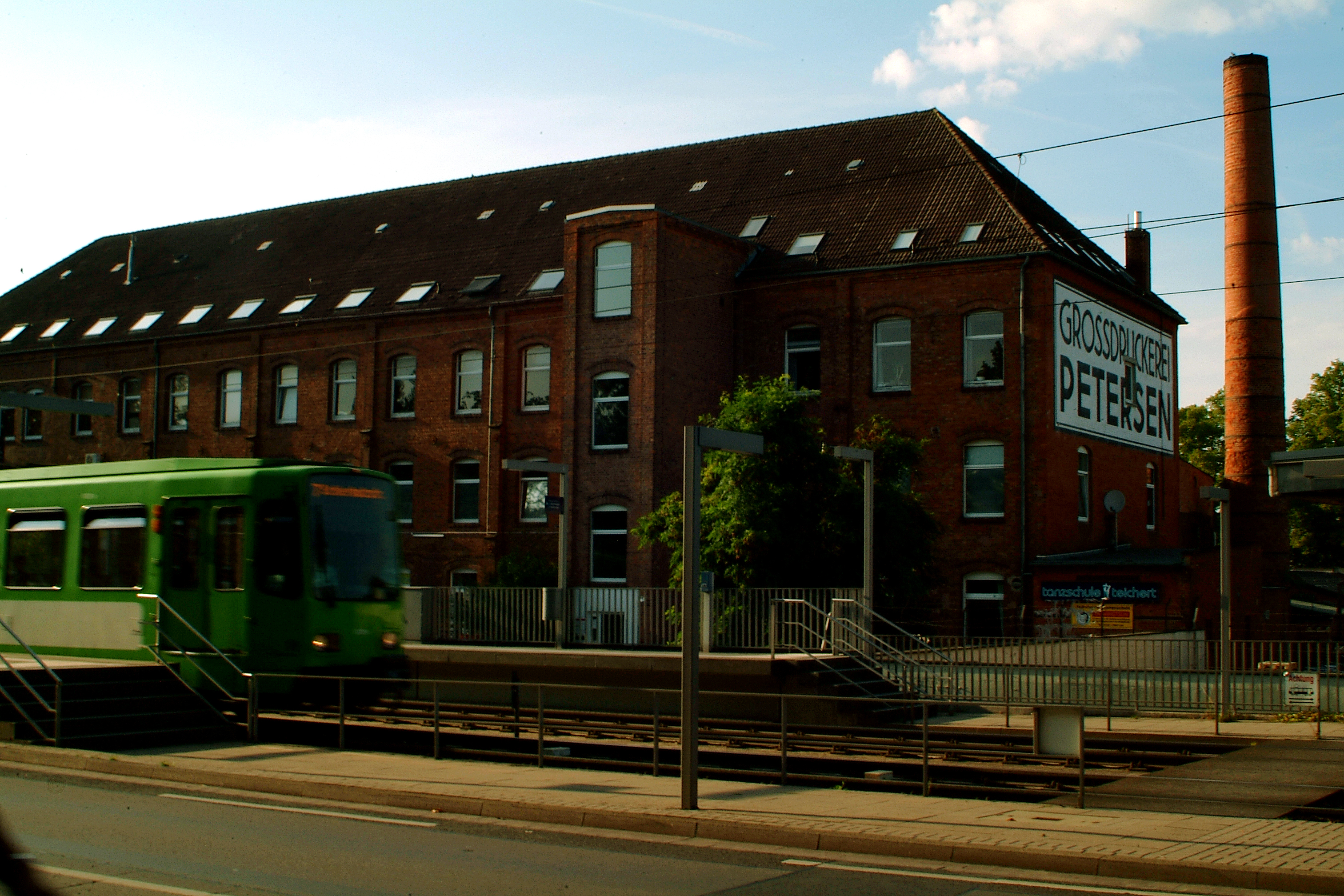 Das Gebäude der ehemaligen "Großdruckerei Petersen, Göttinger Chaussee 115, vom Ricklinger Stadtweg aus gesehen, Stadtbahn-Haltestelle "Wallensteinstraße.